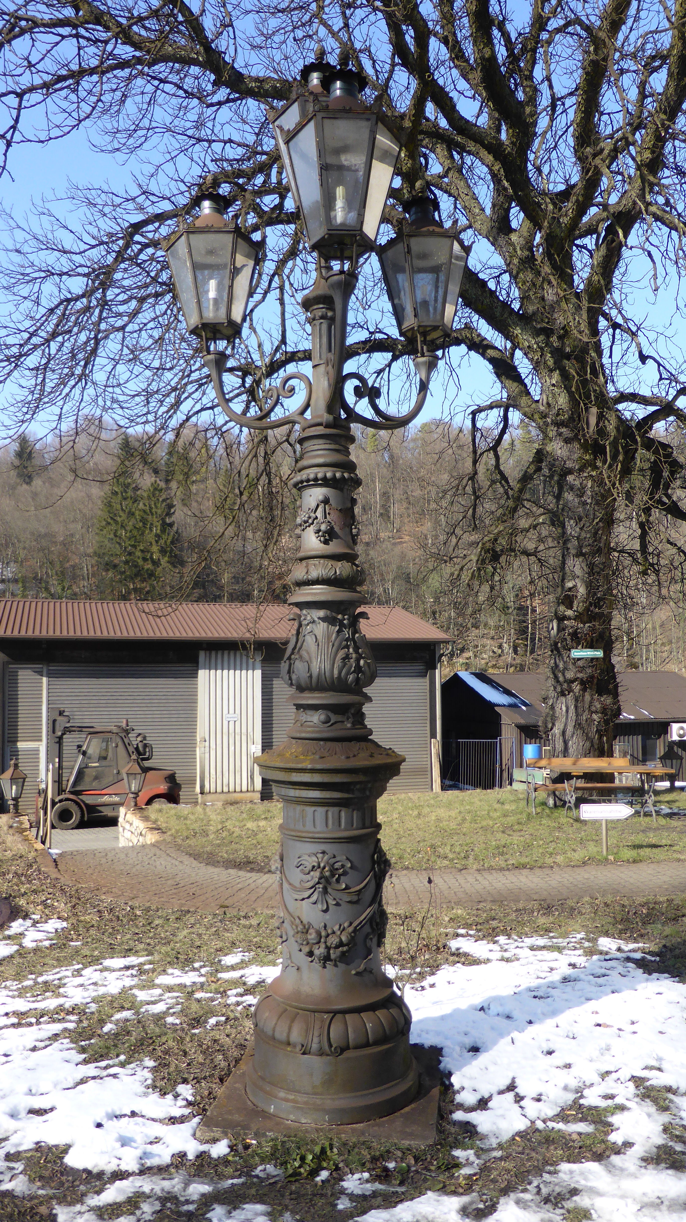 Gußeiserner Leuchter, Carolinenhütte (Kallmünz)